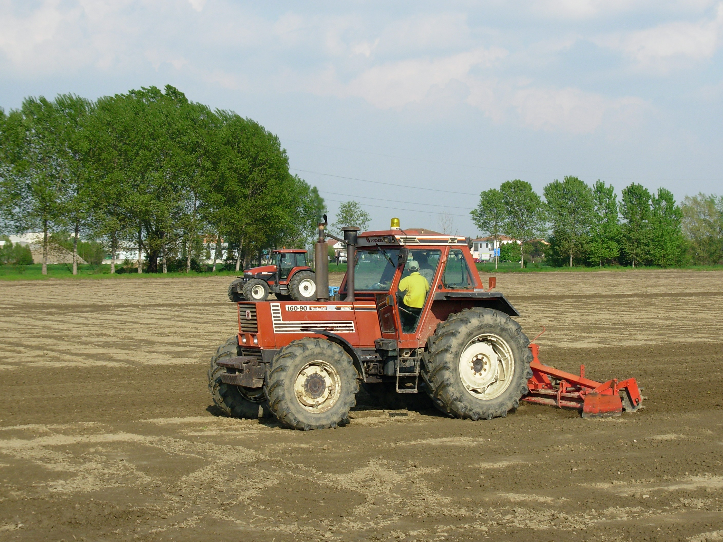 Fiat 160-90 TurboDT, Campagne di Carpiano